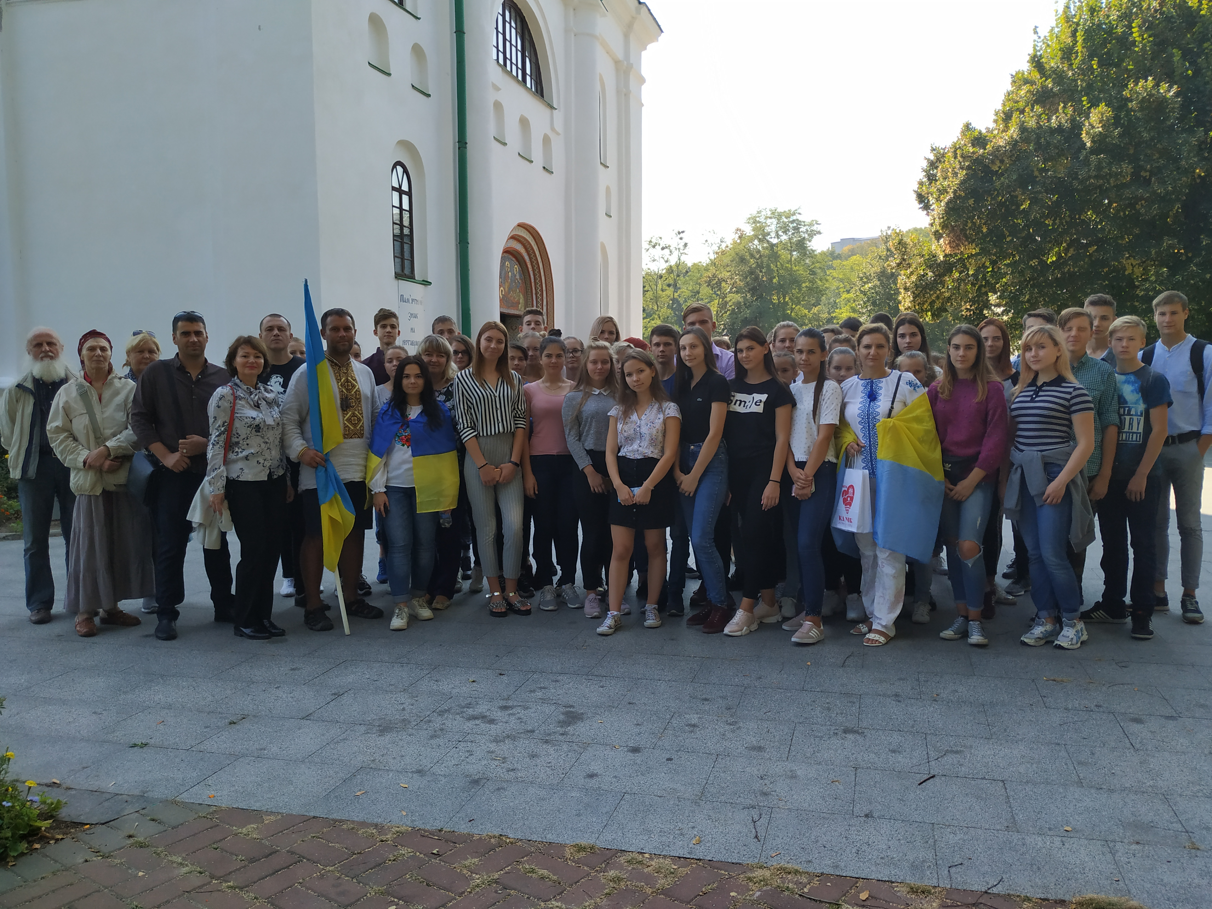 ТД 2-11 Канів